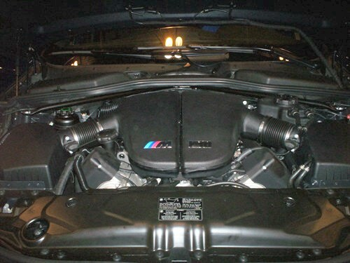 2006 BMW M5 V-10